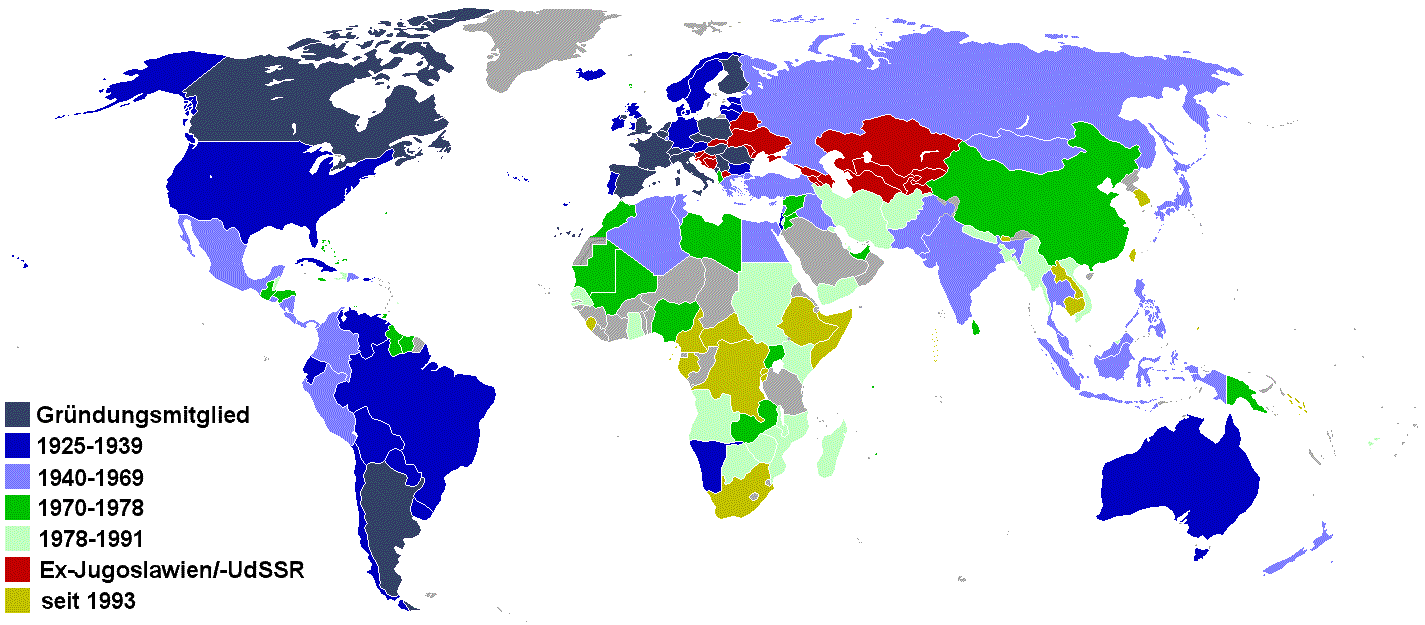 Mitgliedsverbände des Weltschachverbandes FIDE